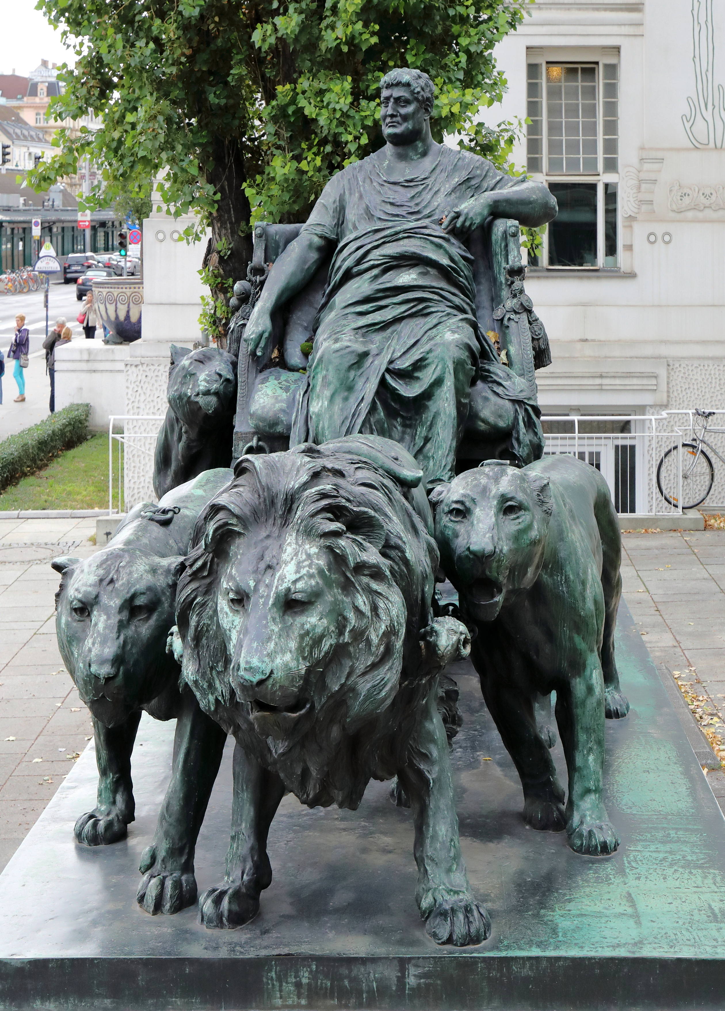 Das Marc-Anton-Monument, auch als Marc-Anton-Gruppe bezeichnet, an der Friedrichstraße und neben dem Secession-Gebäude im 1. Wiener Gemeindebezirk Innere Stadt.Die Bronze-Großplastik wurde von 1899 bis 1900 von dem Secessions-Künstler Arthur Strasser für die Weltausstellung 1900 geschaffen und Ende 1900 oder 1901 neben dem Secessiongebäude aufgestellt. Es zeigt den römischen Feldherrn und Politiker Marcus Antonius im Triumphwagen, der von Löwen gezogen wird.